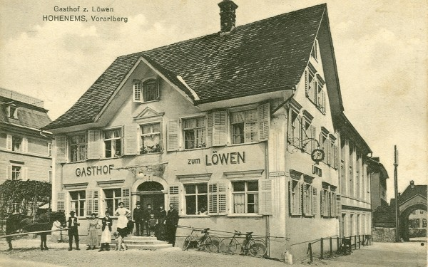 Schloßplatz Nr.:9 in Hohenems; aus dem DEHIO Vorarlberg 1983: Gasthaus, 2geschossig; Zwerchgiebel zum Platz, Rundbogenportal (A.19.Jh?). 3geschossiger Anbau, Pilastergliederung, Festonschmuck mit sezessionistischem Einfluß. 2011 generalsaniert.